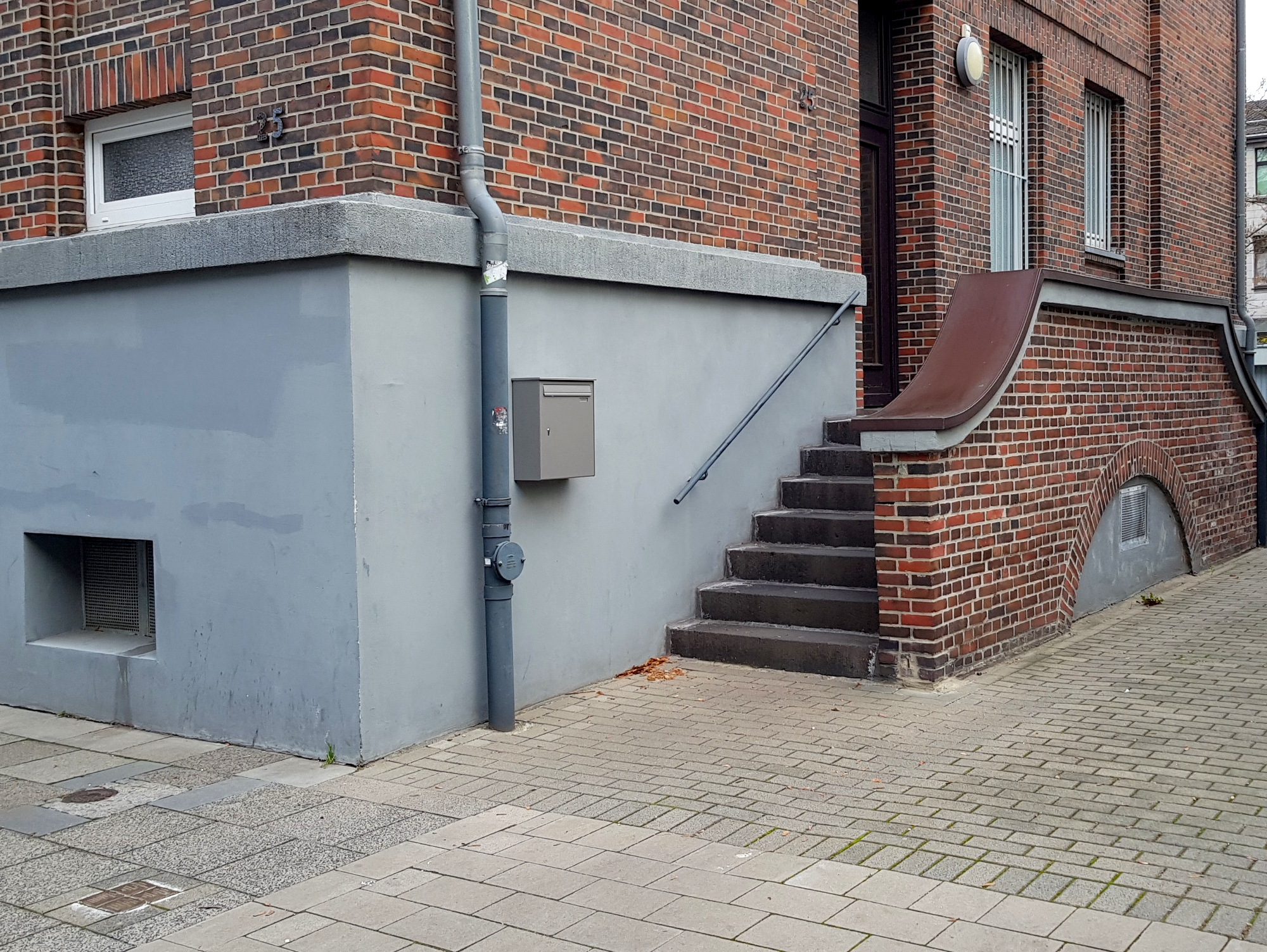 Stolpersteine Lerchenstr. 25, Duisburg-Neudorf